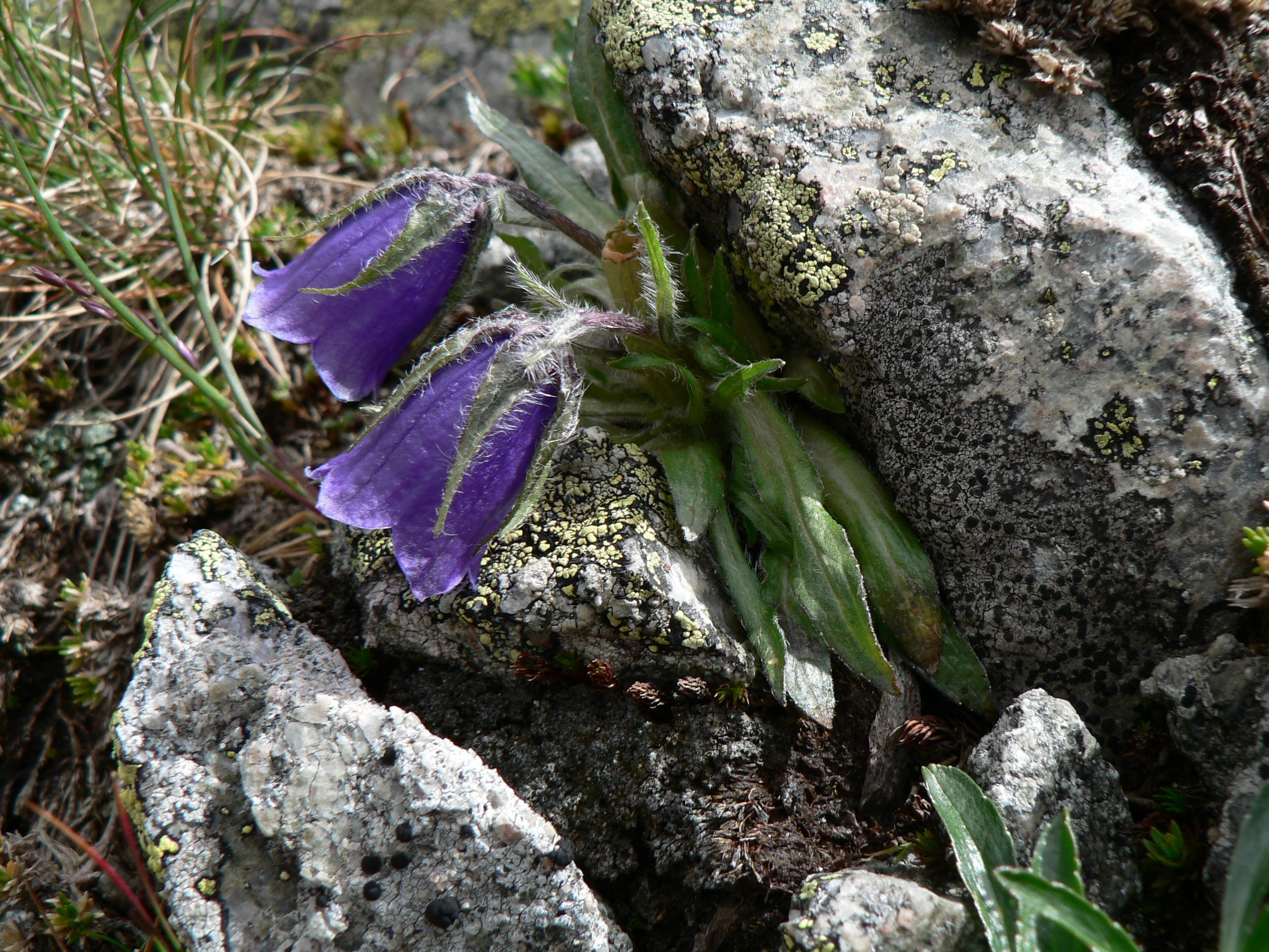 Zvonek alpský, Javorová dolina, Vysoké Tatry